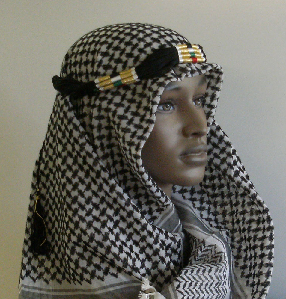 habillement modeste pour des musulmans et des non-musulmans